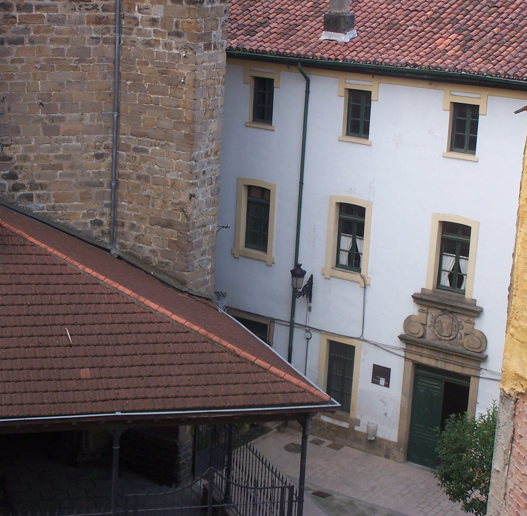 Ordizian dago dorretxe hau. Udalak bertan egiten zituen bere bilerak 1511 arte